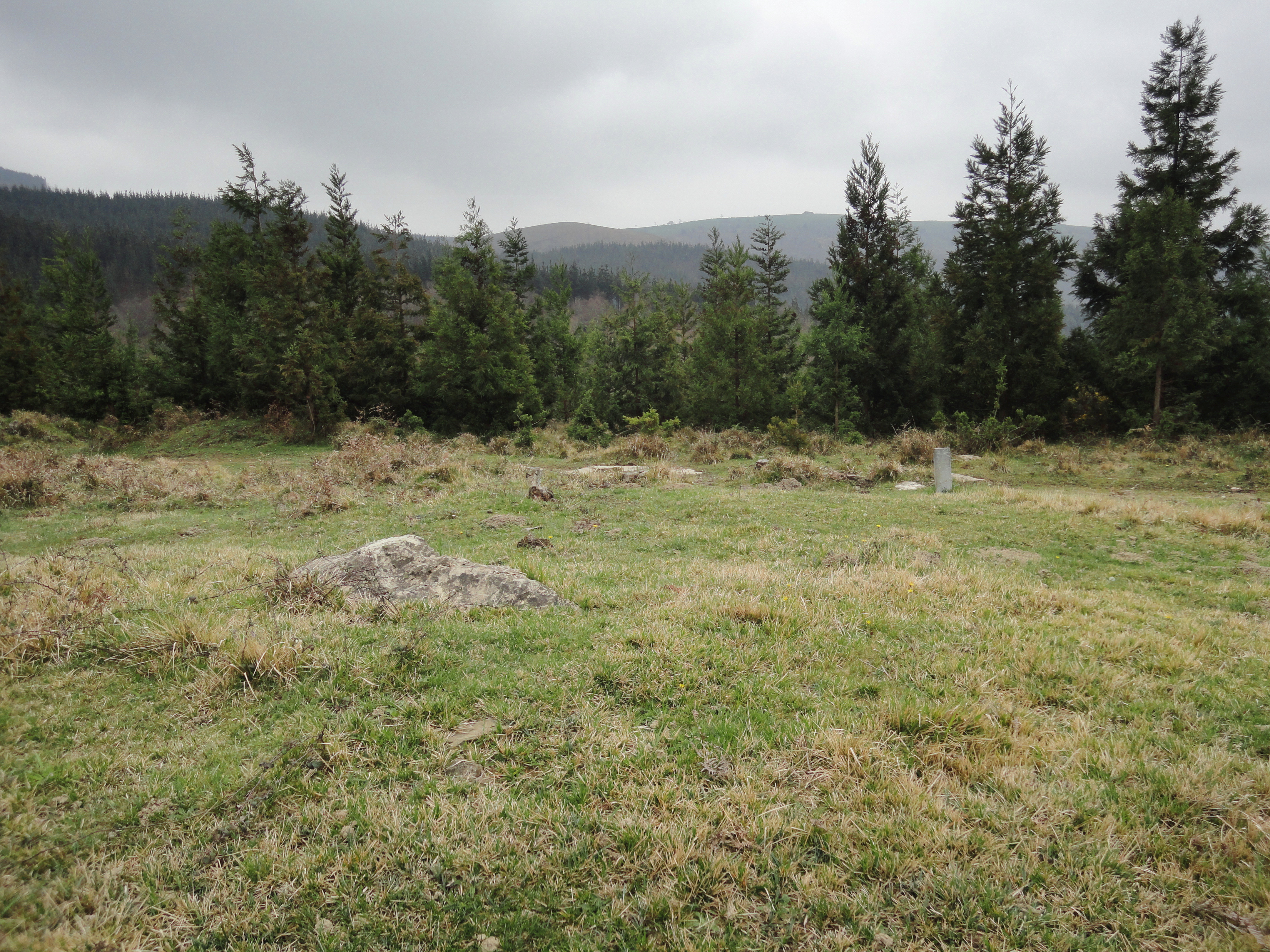 Beldarrain trikuharria